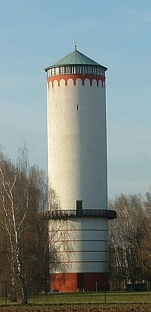 Versuchsturm auf dem Gelände der Firma Mazda in Weißkirchen (Oberursel) /Germany near Frankfort